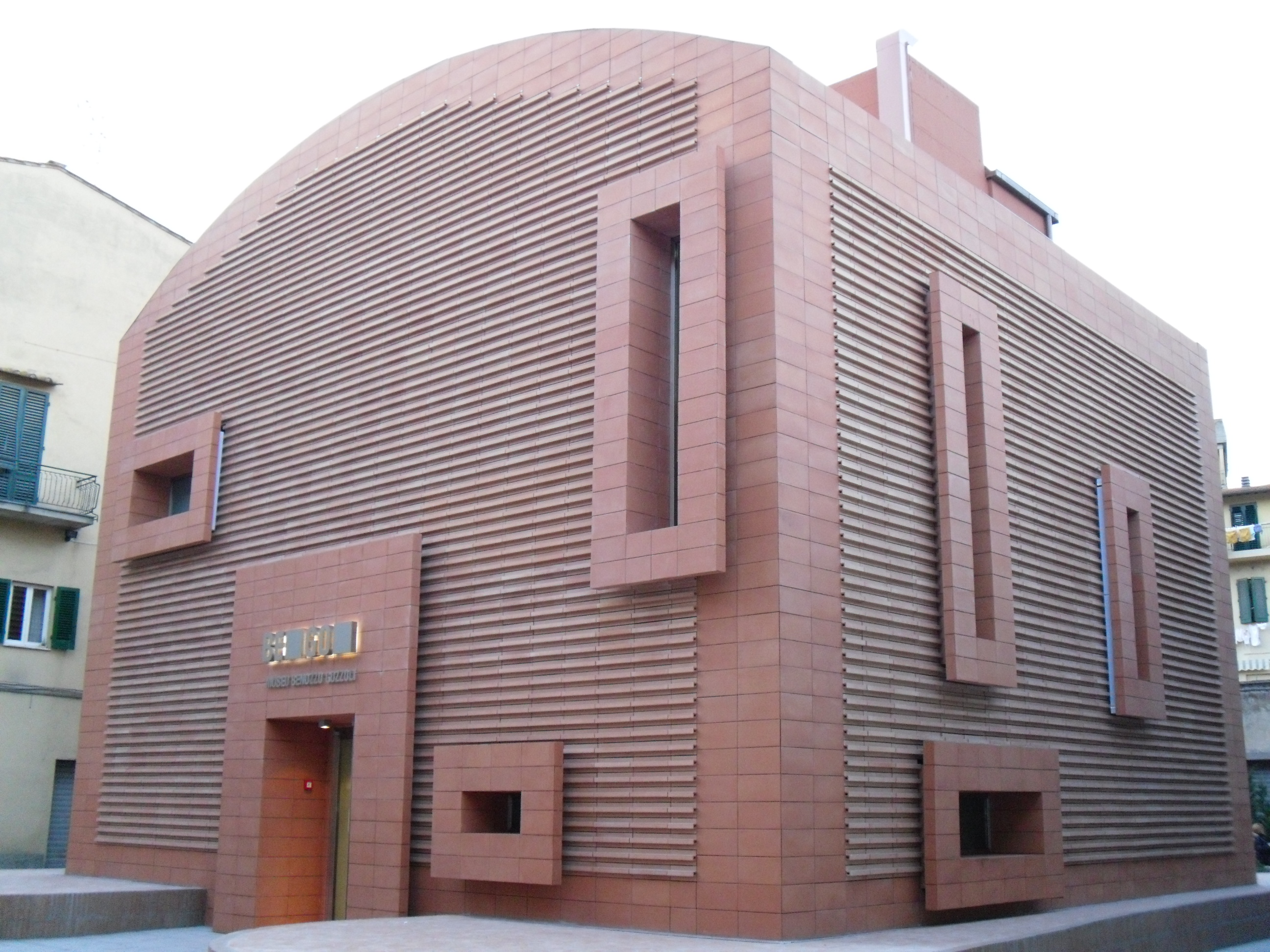 BEGO-Museo Benozzo Gozzoli, Castelfiorentino, veduta dell'esterno